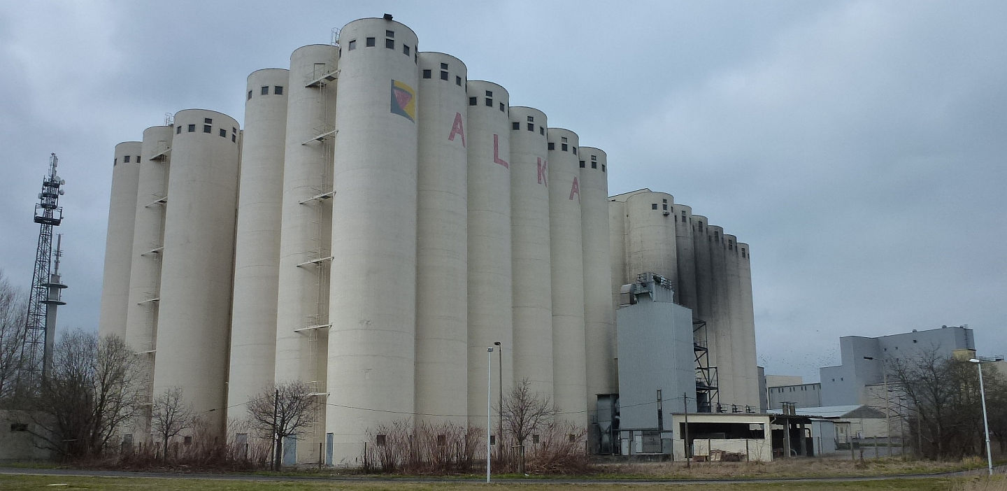 Altenburger Kraftfutterwerk und Getreidehandel (ALKA) GmbH